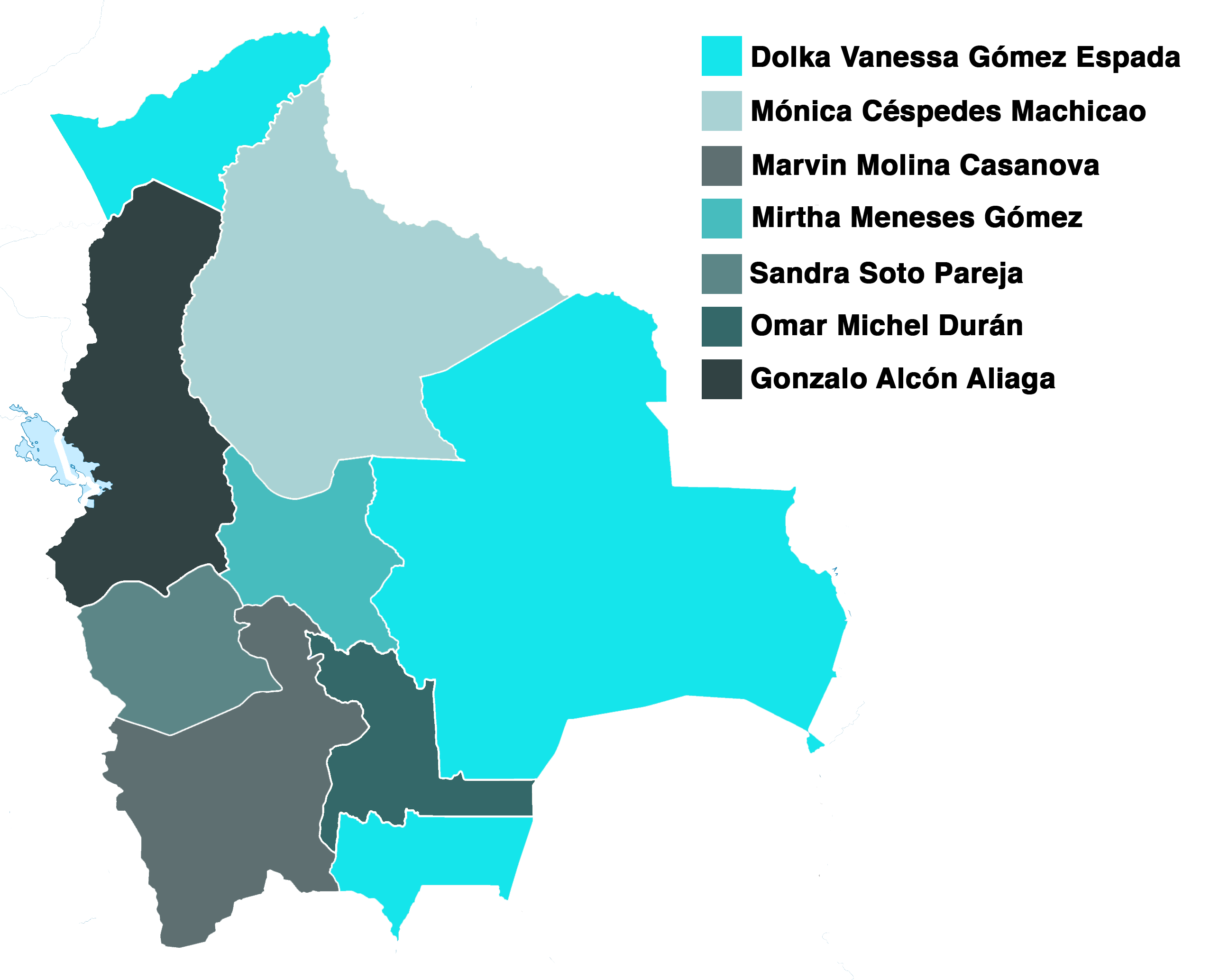 Candidato más votado por departamento en las elecciones de miembros del Consejo de la Magistratura, parte de las elecciones judiciales de Bolivia de 2017